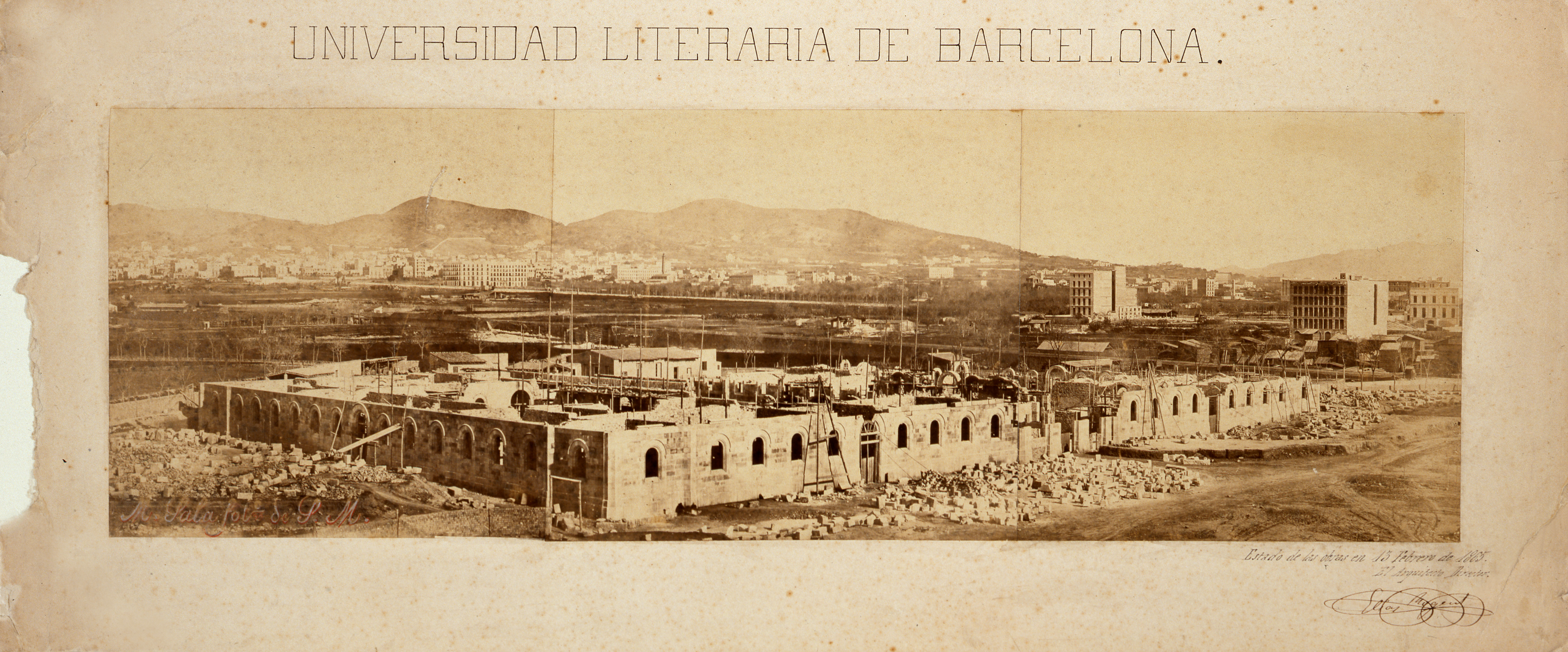 Edifici de la Universitat de Barcelona en construcció. Al fons els primers edificis de l’ Eixample. 1865